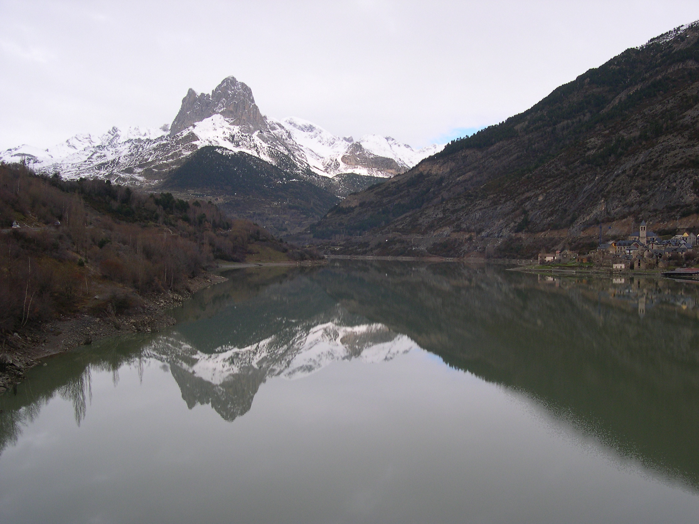 Embalse de Lanuza y Foratata